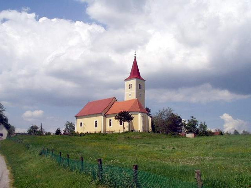 Rakovec - Church St.George